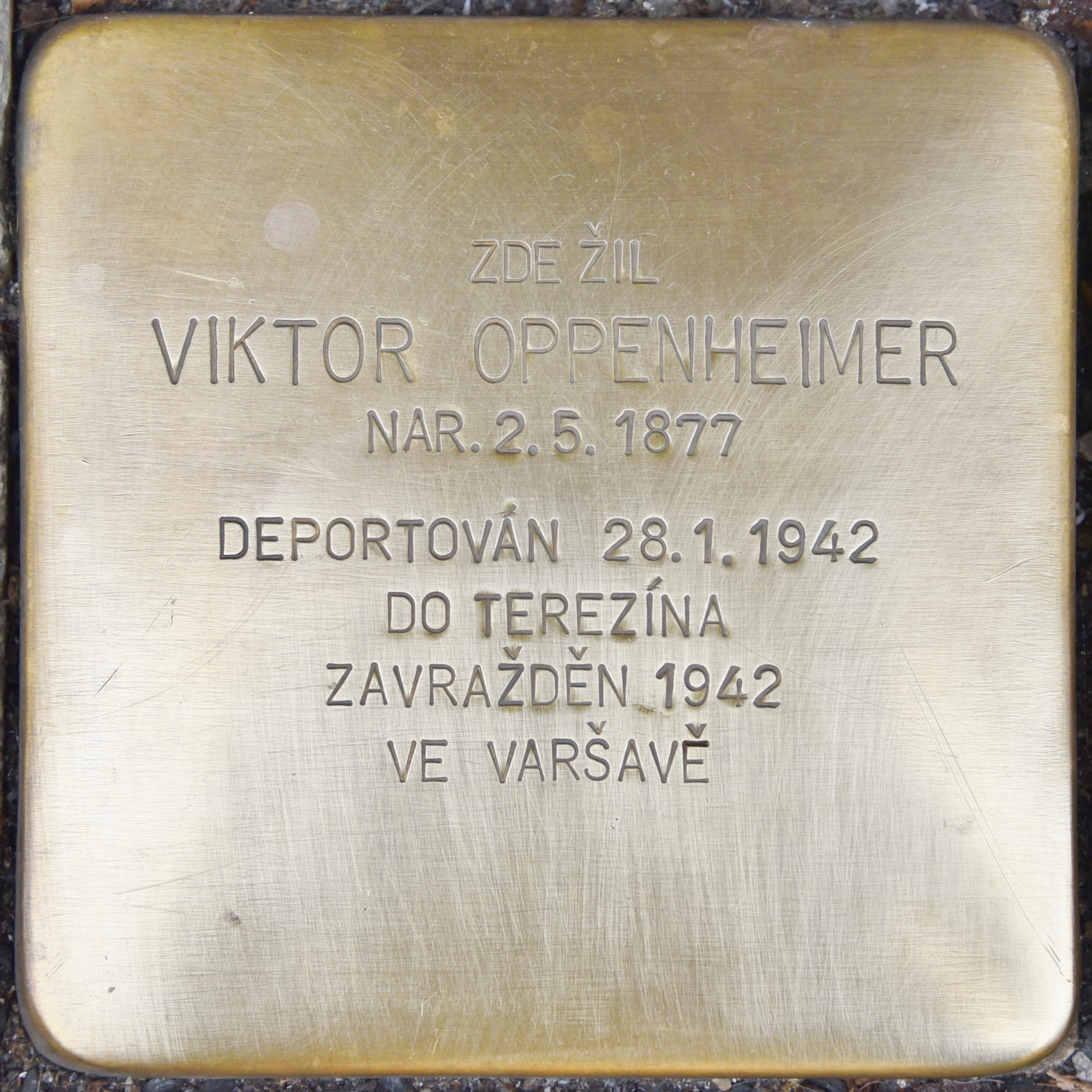 Gedenkstein für Viktor Oppenheimer